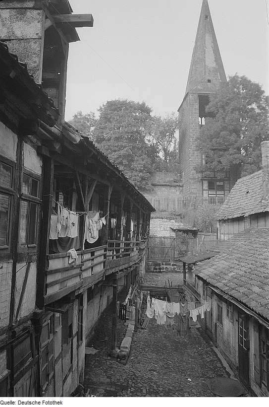 Original image description from the Deutsche Fotothek Quedlinburg. Blick über einen Hof zu einem Wachturm (Pulverturm?)